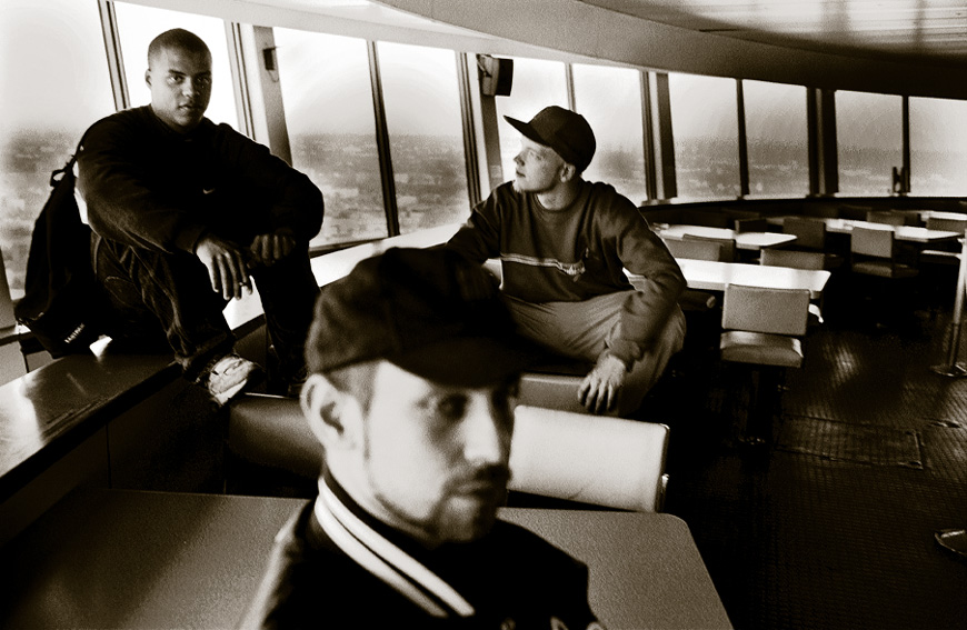 Die Beginner aufm Fernsehturm in HH